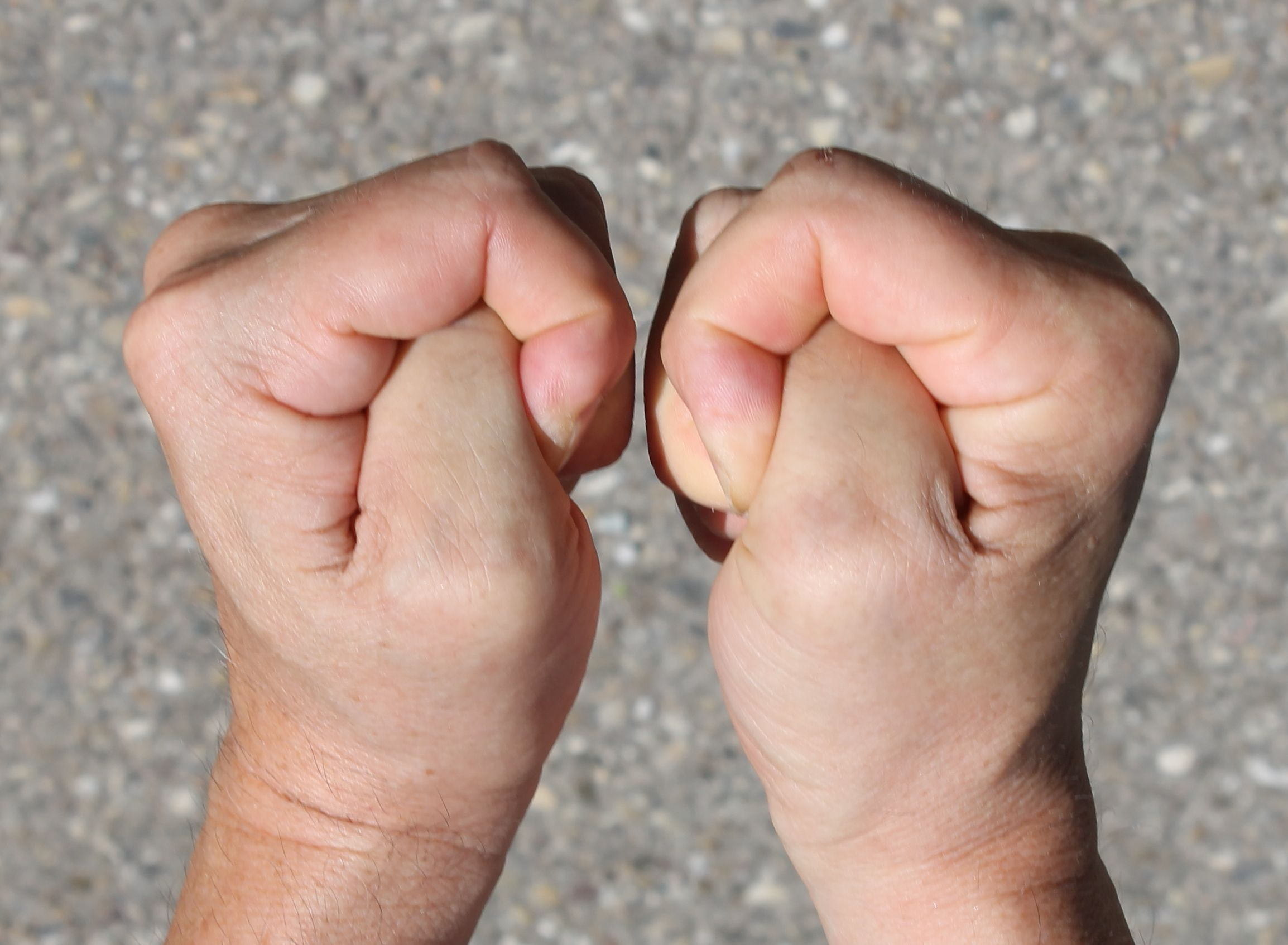 Ganz feste beide Daumen drücken..., d.h. Glück wünschen